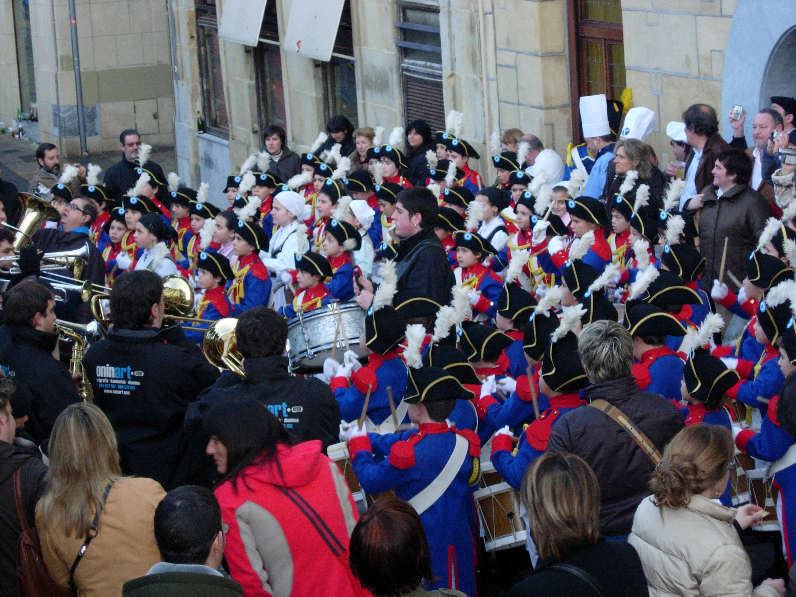 Tamborrada de San Sebastián, Companía Infantil de Euskal Billera en 2008